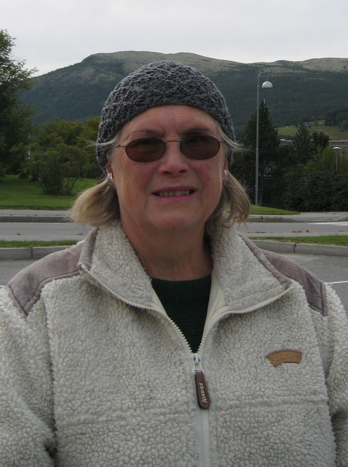 Unni-Lise Jonsmoen